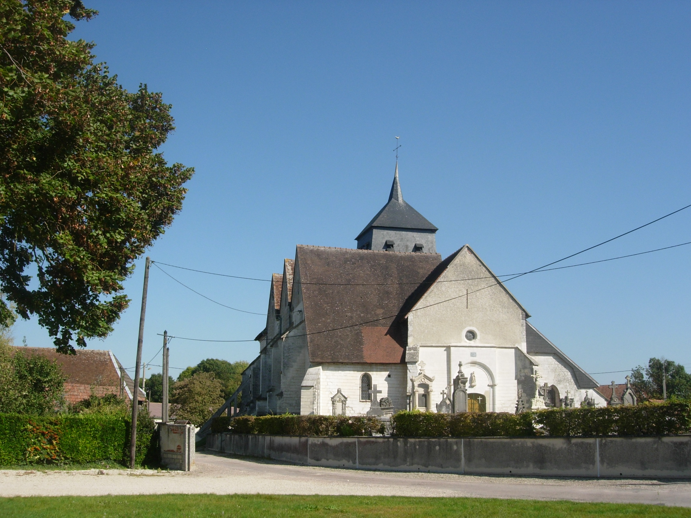 Eglise d'Herbisse (Aube) .